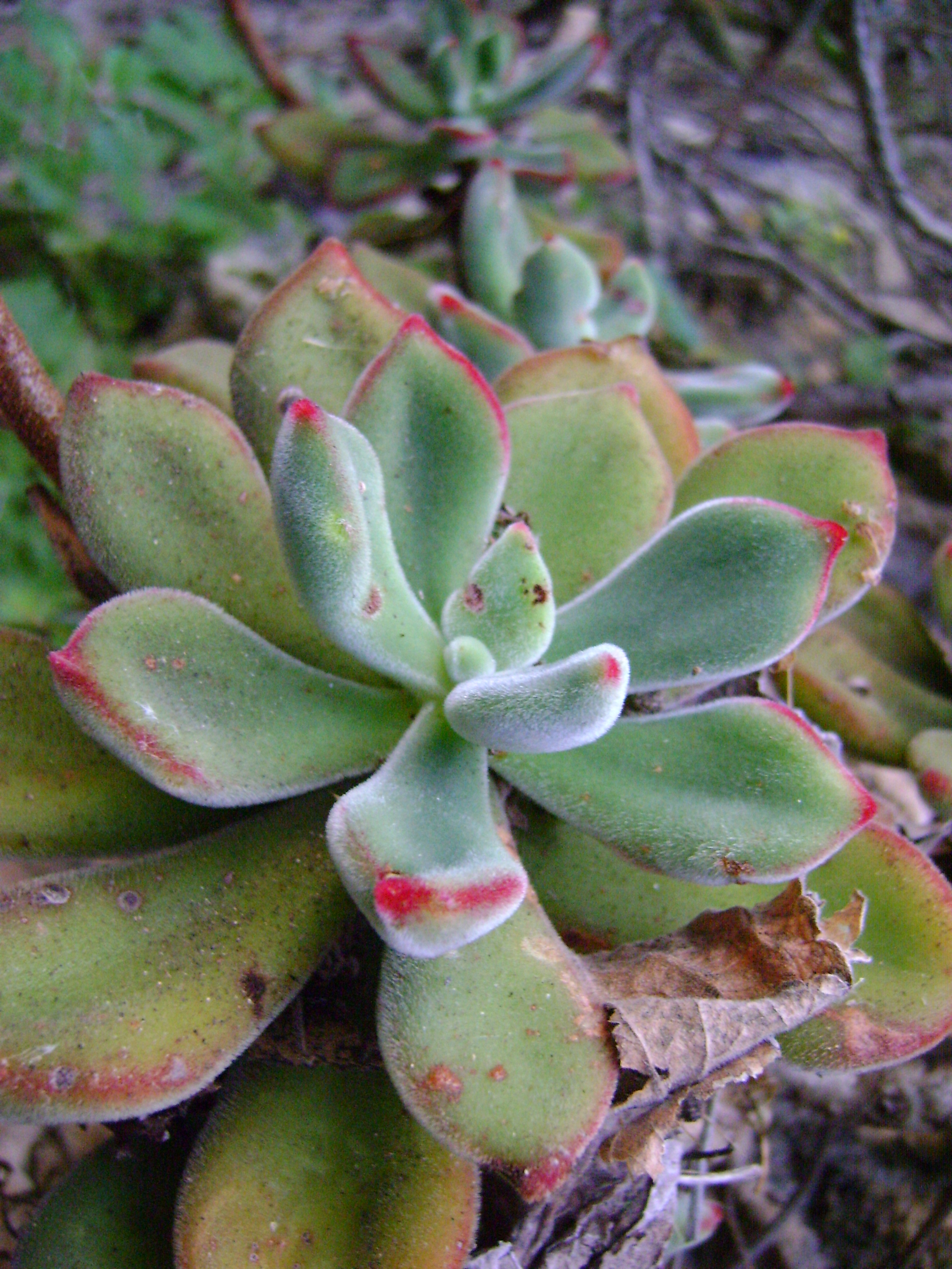 West point 109, Oaxaca